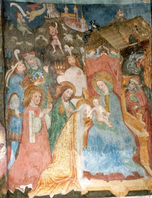 Glanegg: spätgotischer Flügelaltar in der Pfarrkirche St. Gandolf